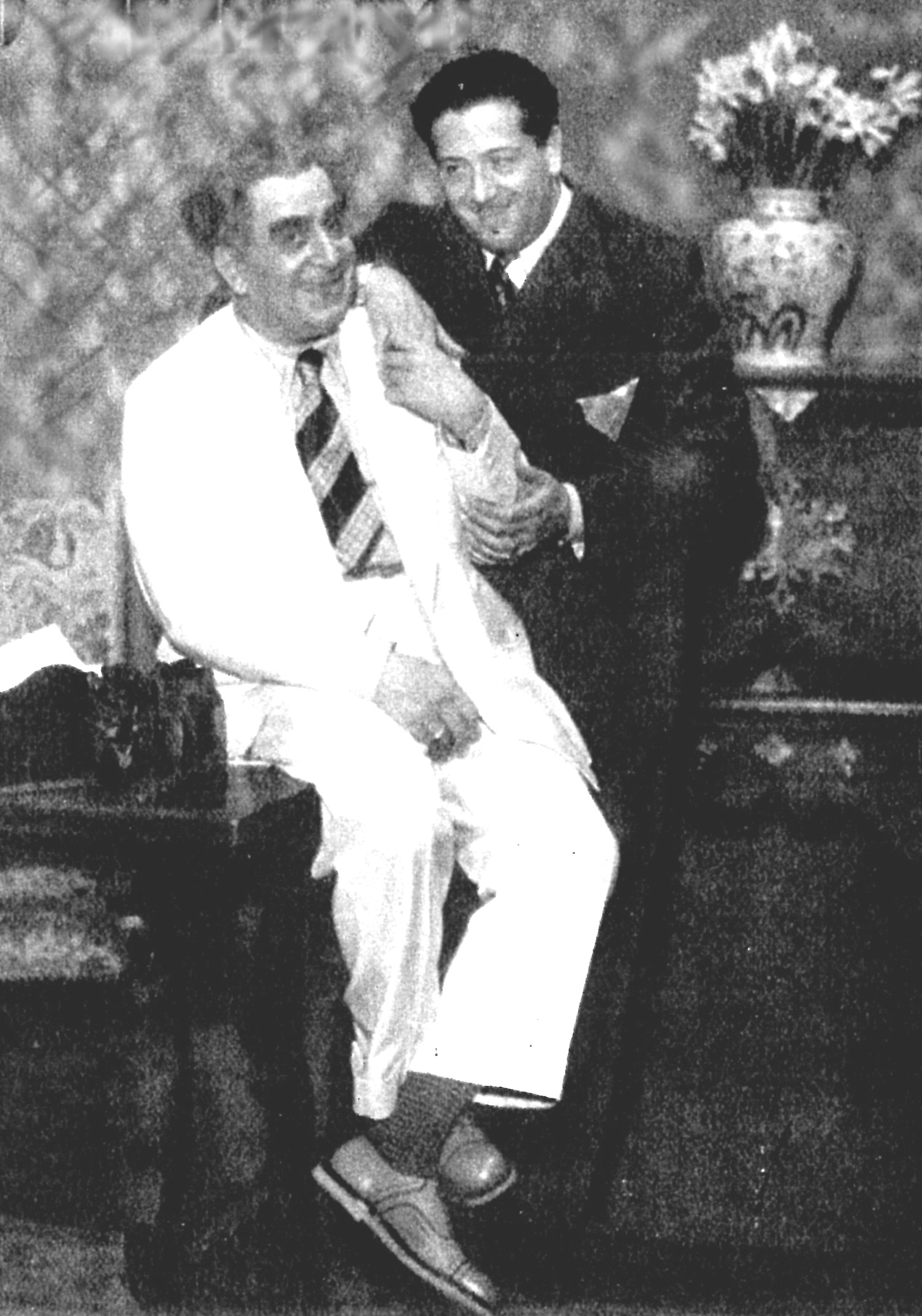 Arturo Falconi (a sin.) e suo figlio Dino, rispettivamente interprete ed autore di "Joe il rosso" (Matarazzo, 1936)